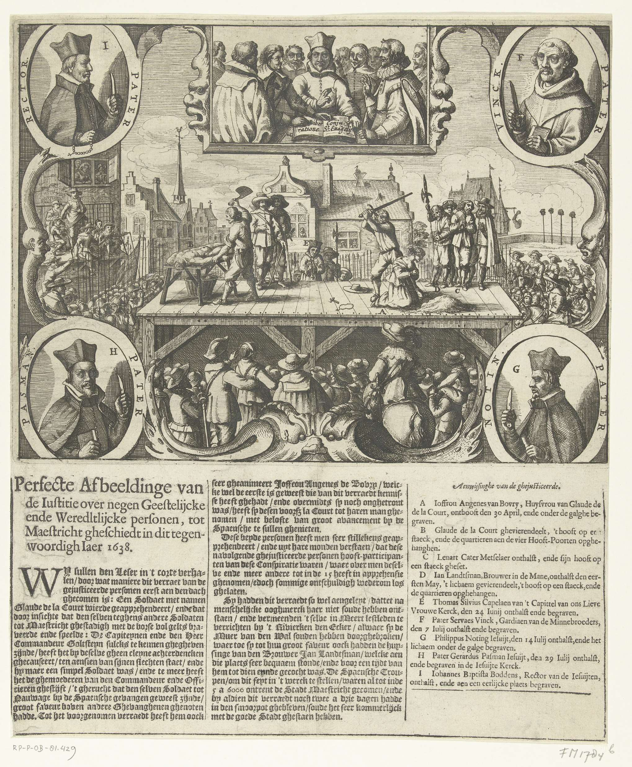 Executies te Maastricht van de negen personen die samenzwoeren om Maastricht aan de Spanjaarden te verraden, 1638. Op een schavot wordt Claude de la Court gevierendeeld en zijn vrouw Angenes van Bovry onthoofd op 30 april 1638. In de hoeken portretten van de vier Roomse geestelijken die bij het complot betrokken waren en in juli onthoofd zijn. Bovenaan leggen de negen samenzweerders een eed af op de bijbel. Onder de prent is een tekst gedrukt van 3 kolommen met een legenda van de veroordeelden A-I. Collectie Rijksmuseum Amsterdam, RP-P-OB-81.429.